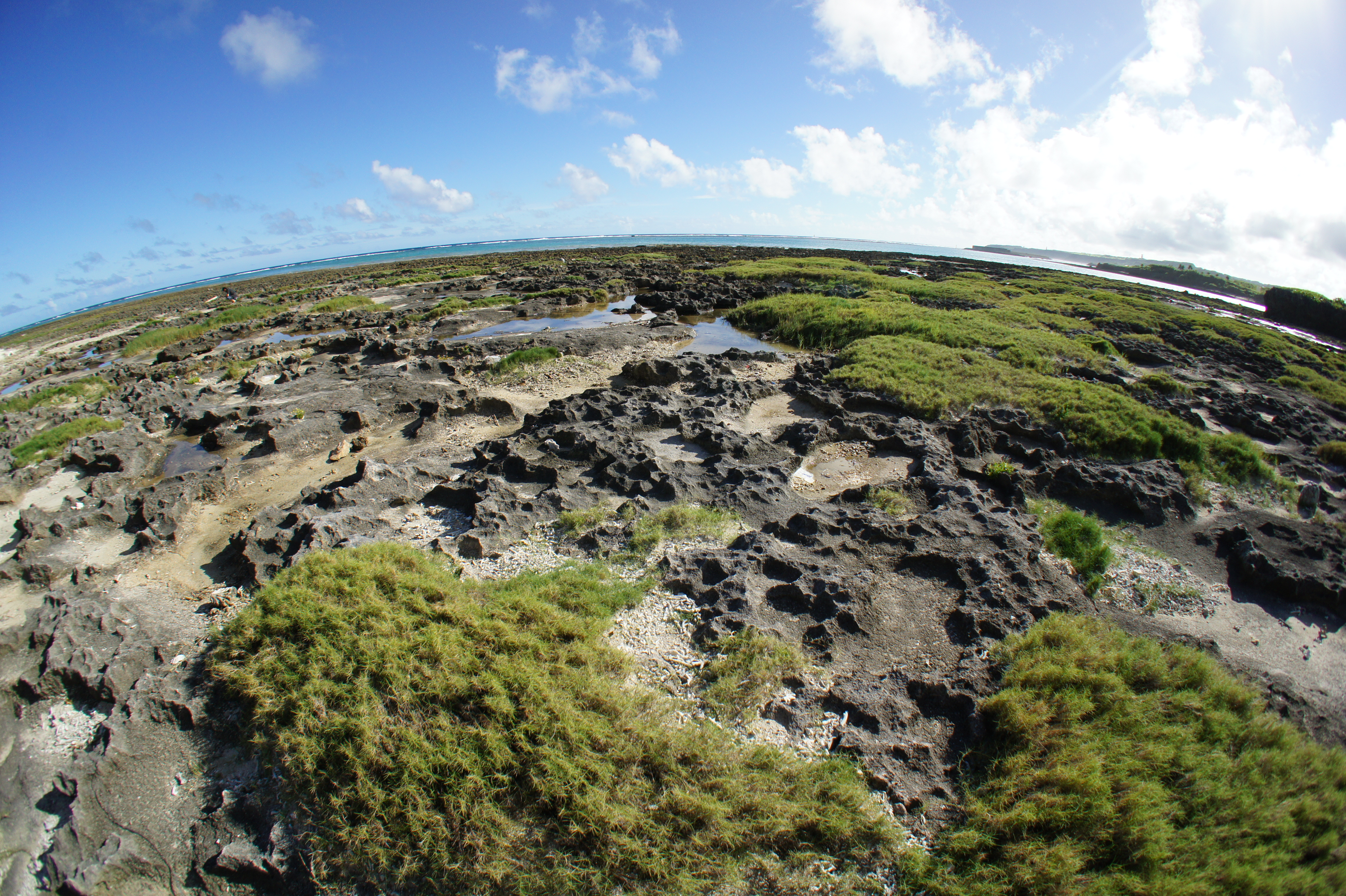 奥武島（南城市）西側の海岸（干潮時）。